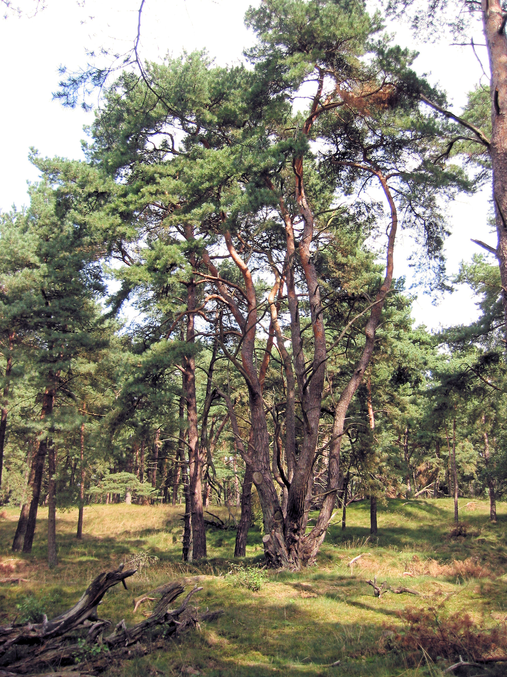 Wekeromse Zand Grove den (Pinus sylvestris)